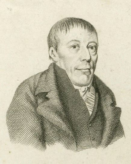 Paulus van Hemert (1756-1825), kopergravure (1816) van Jacob Ernst Marcus (1774-1826) naar Hendrik Willem Caspari (1770-1829).